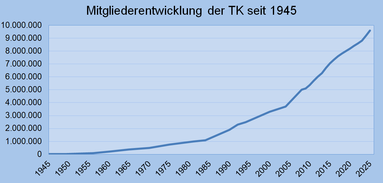 Mitgliederentwicklung der TK (Techniker Krankenkasse) seit 1945